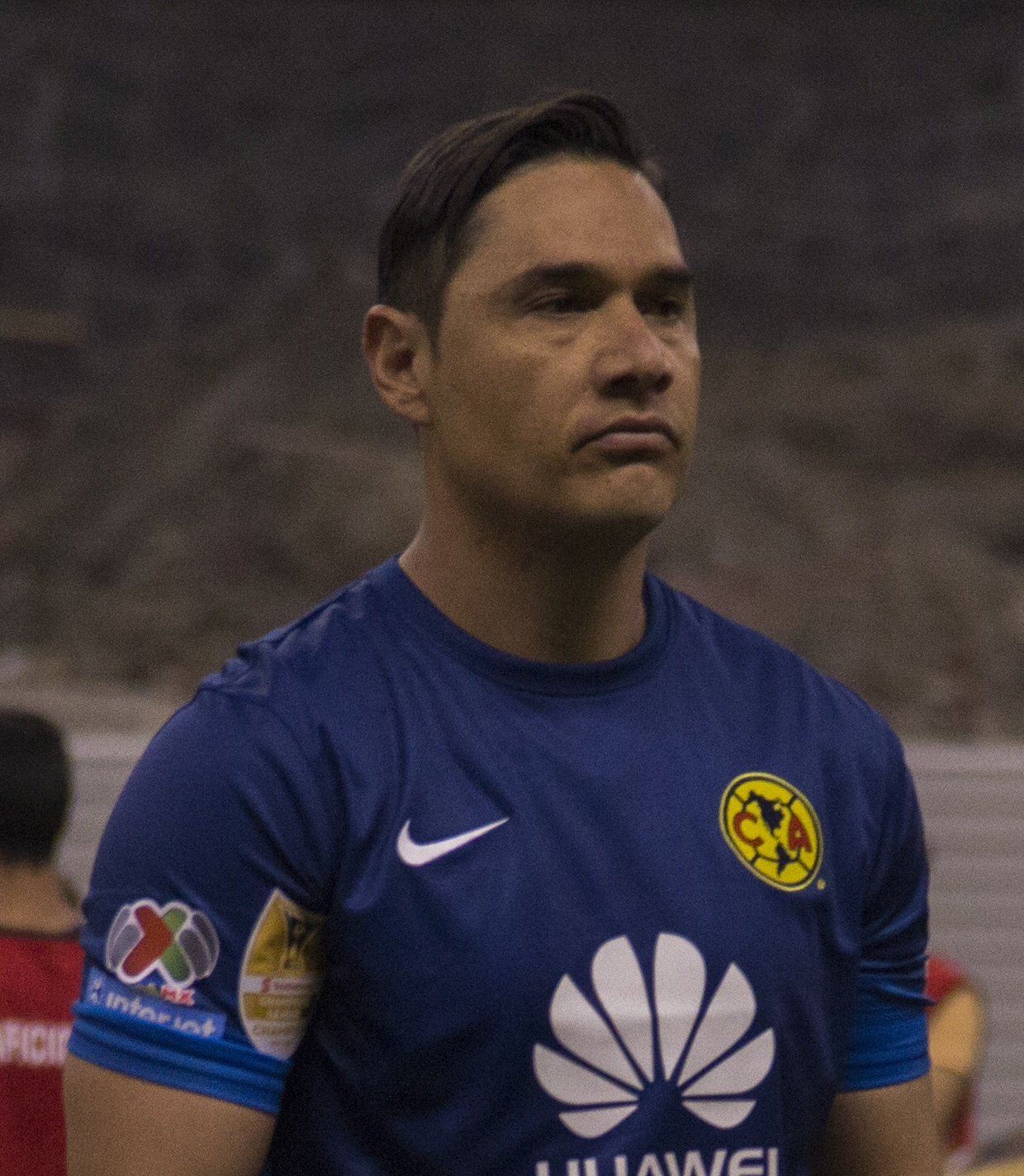 Moisés Muñoz con América.